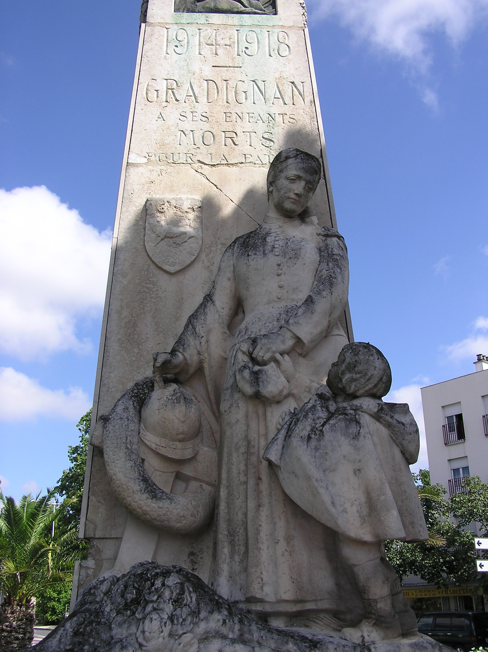 Monument aux morts humaniste de Gradignan